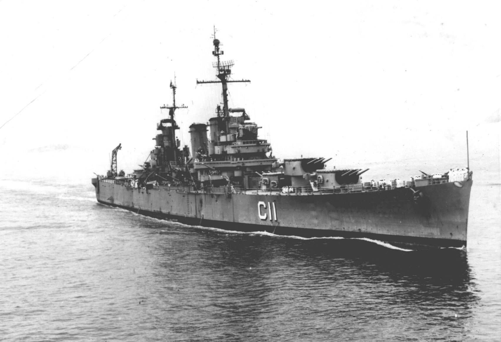 Arquivo liberado pela Marinha do Brasil através de projeto GLAM com Wiki Educação Brasil